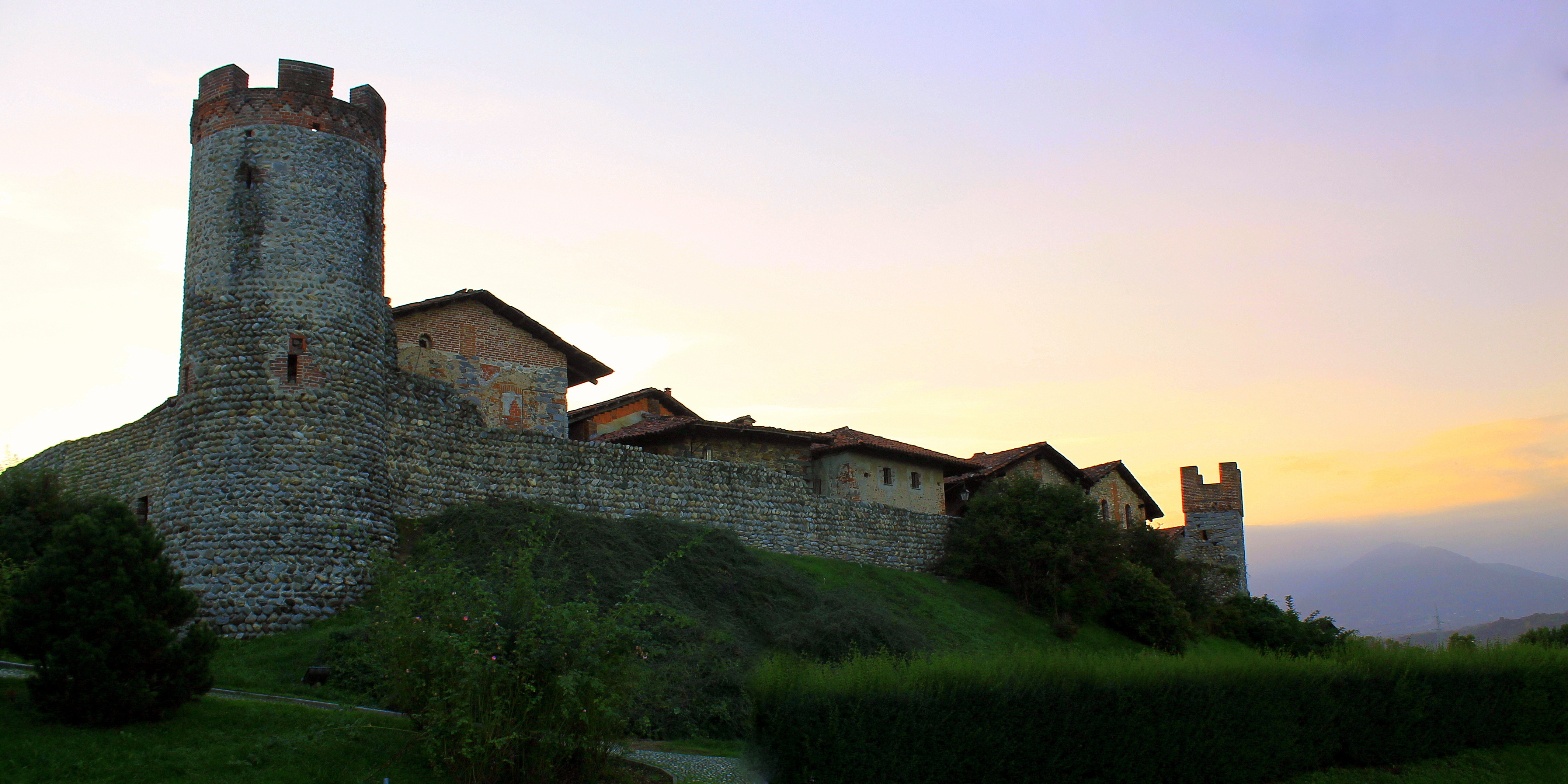 Ricetto medievale di Candelo (spazi esterni dentro e fuori le mura) This is a photo of a monument which is part of cultural heritage of Italy.